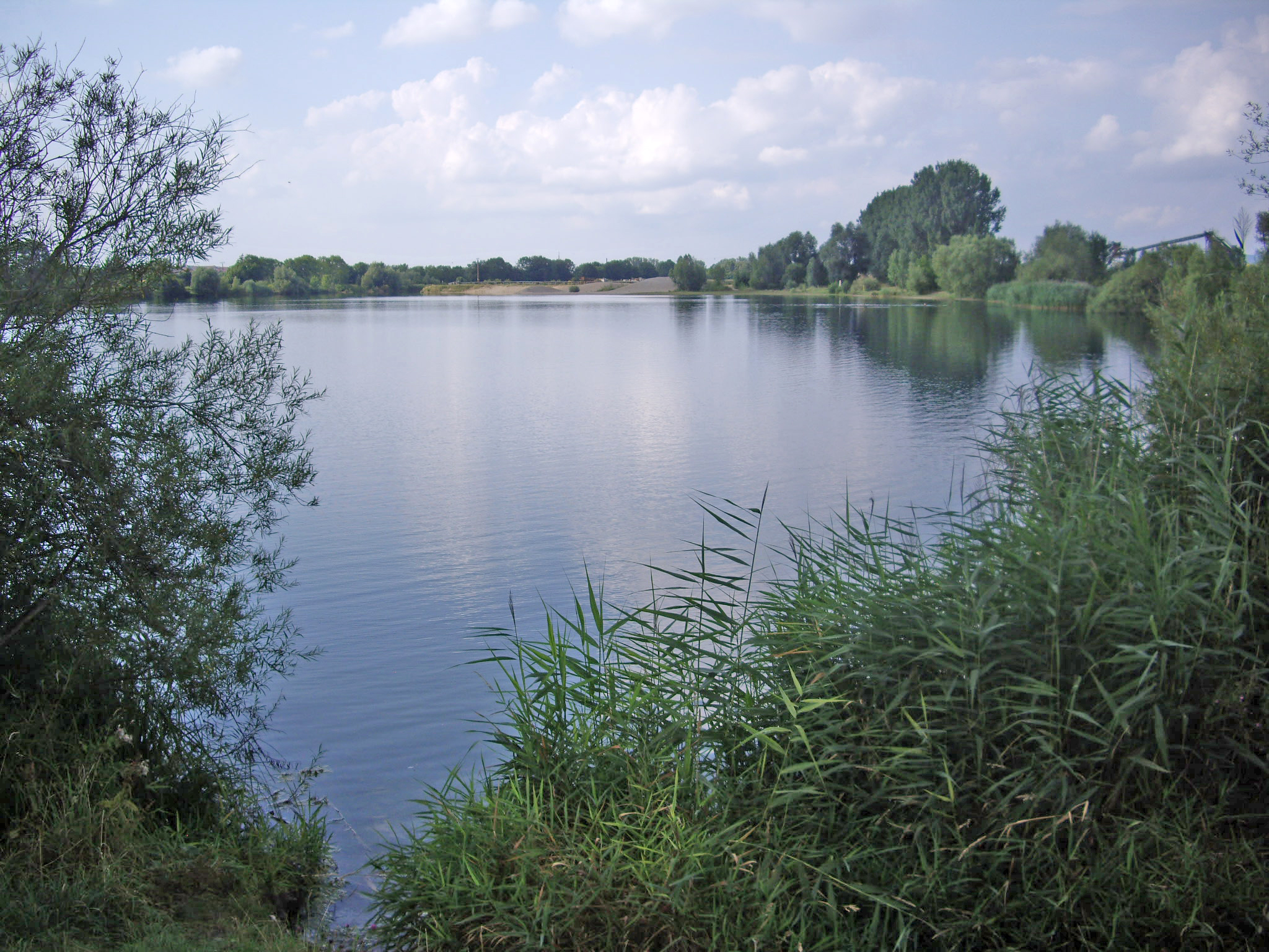 Rosdorfer Baggersee bei Göttingen, vom Südufer gesehen. Rechts im Hintergrund sind Förderbänder zu sehen. In der Bildmitte hinter dem Wasser ein waagrecht verlaufendes Förderband, davor Kiesberge. Im Vordergrund Schilfrohr. 7.8.2014. Foto: F. Welter-Schultes.